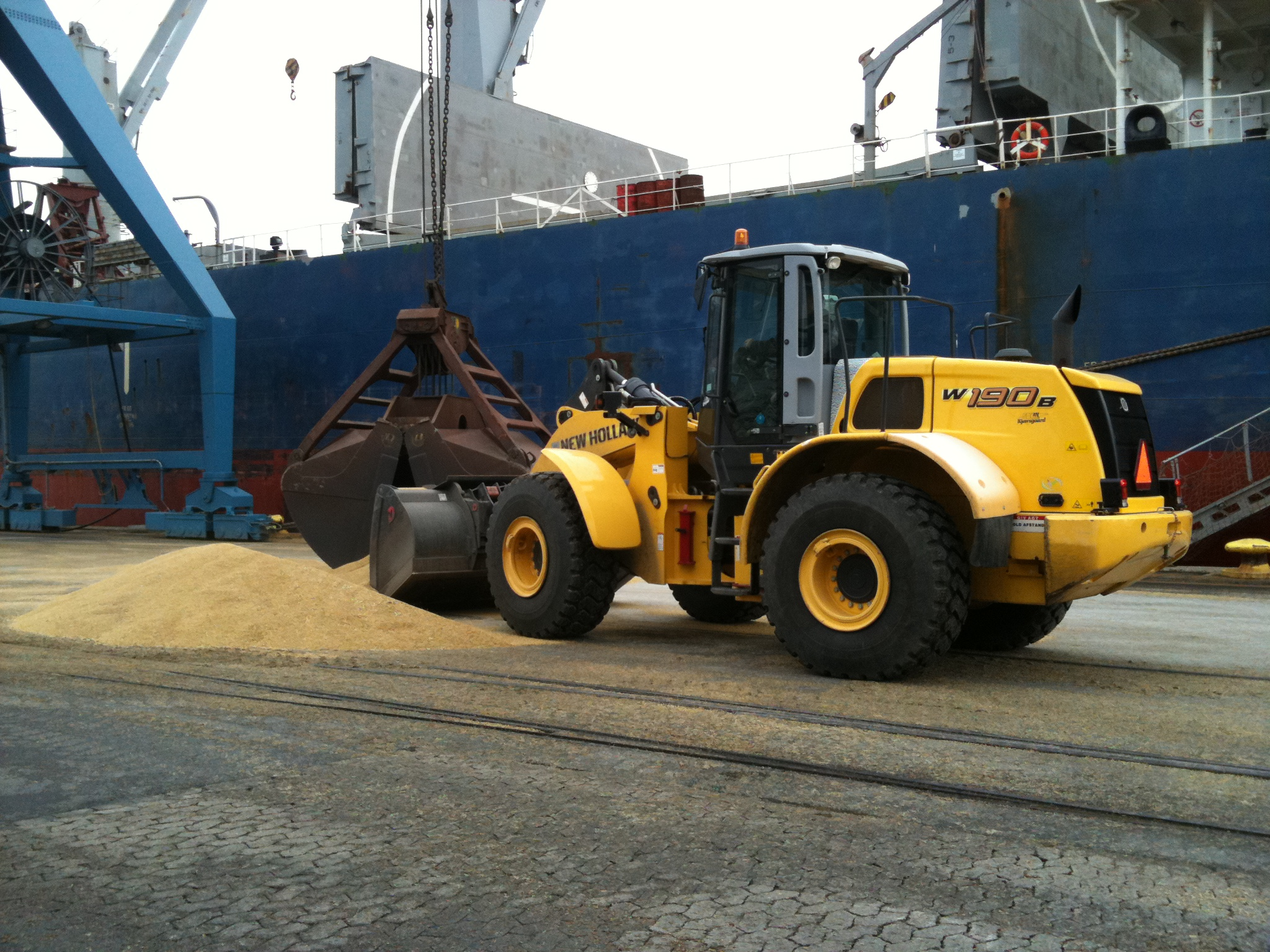 Gummiged der er ved at skrabe korn sammen så kranen kan samle det op. på Fredericia Havn.